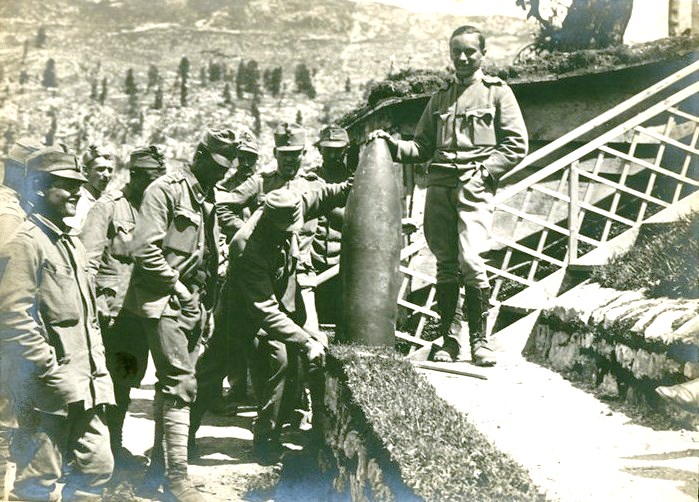 Снимка на австро-унгарски войници край неексплоадирал италиански снаряд в Доломитите, Северна Италия през Първата световна война.